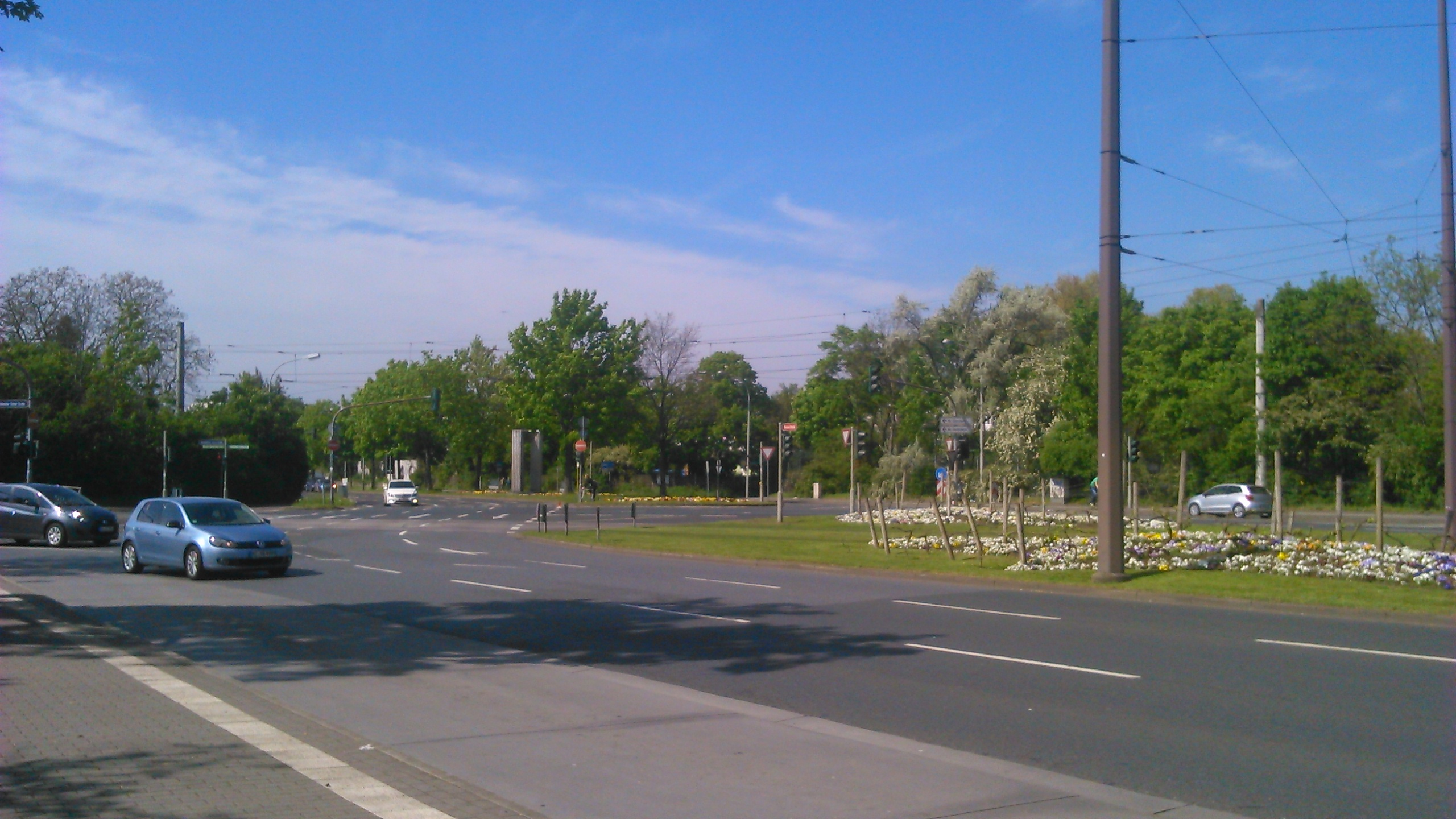 Blick auf das Pariser Tor in der Mainzer Oberstadt